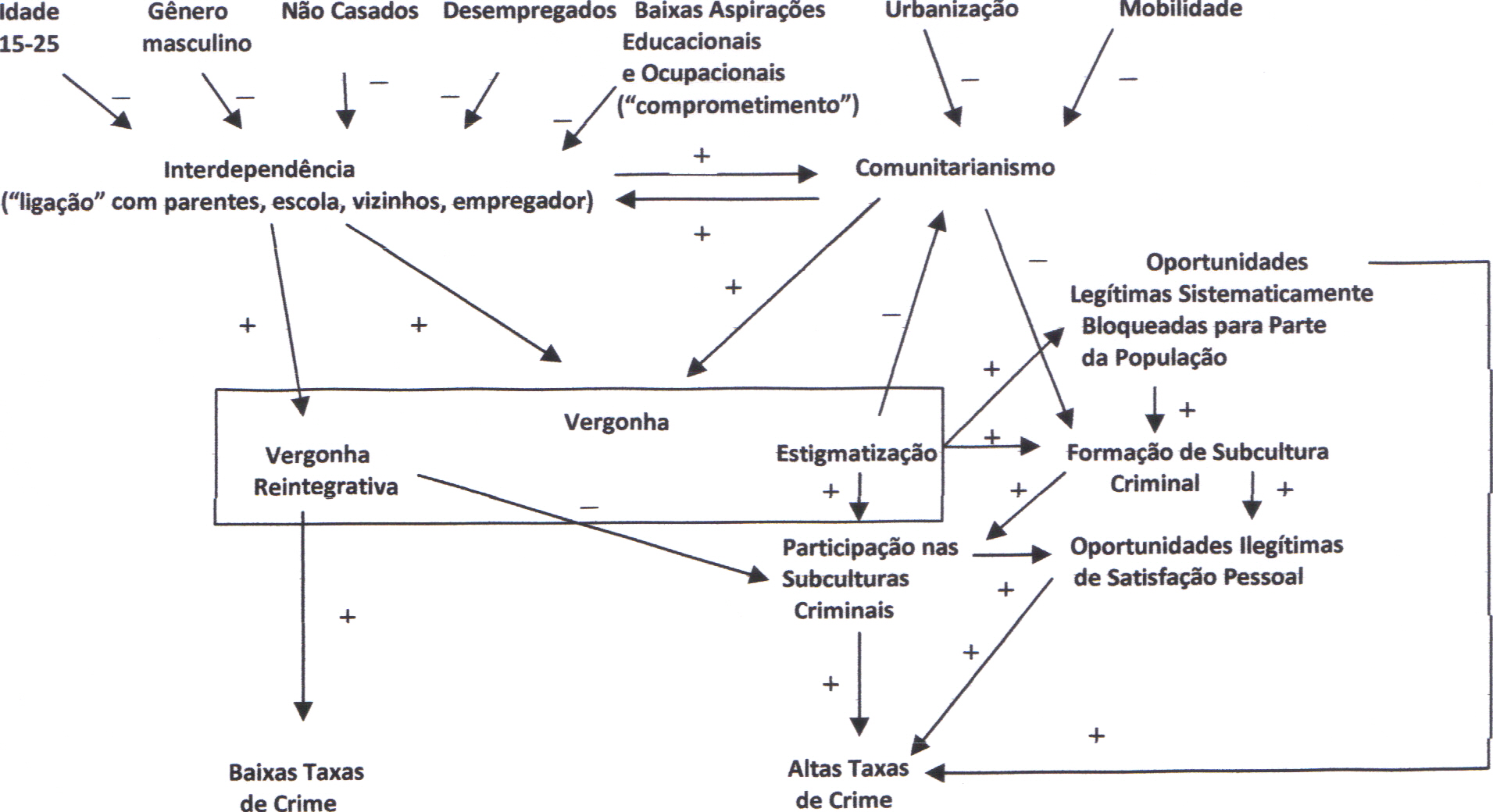 fluxograma